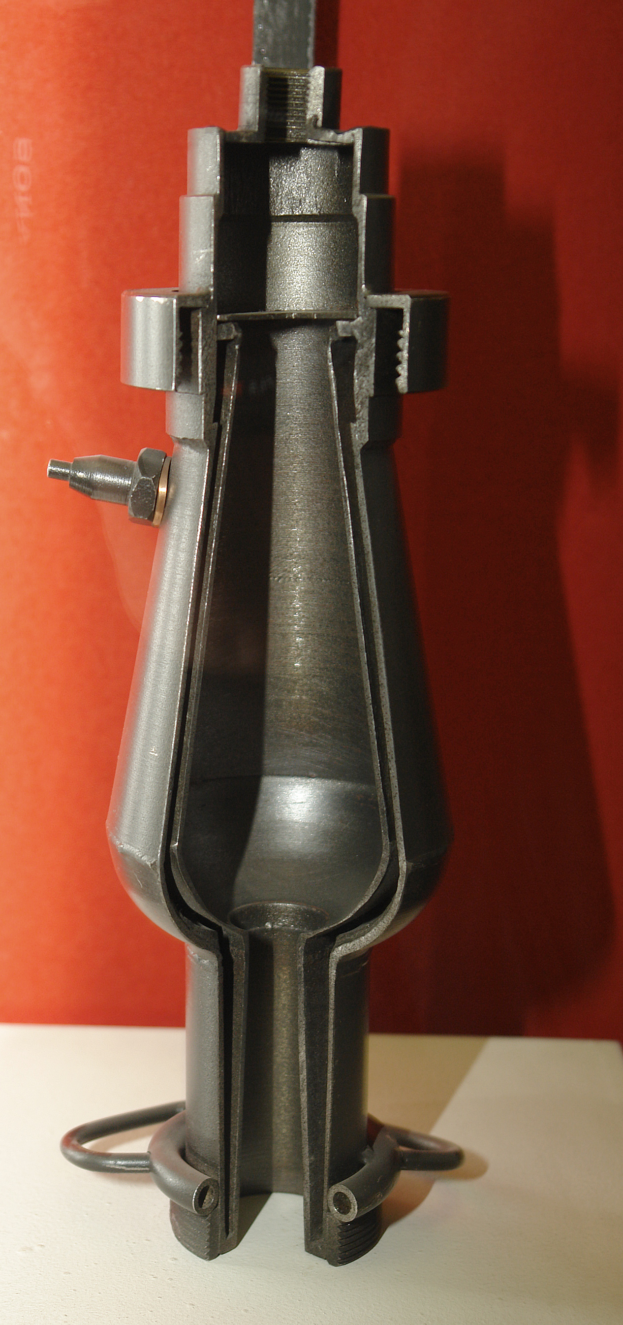 Жидкостный ракетный двигатель 10. Музей космонавтики и ракетной техники; Санкт-Петербург. This photograph was taken in Museum of Space and Missile Technology (Saint Petersburg) Object location59° 57′ 07″ N, 30° 19′ 16″ E